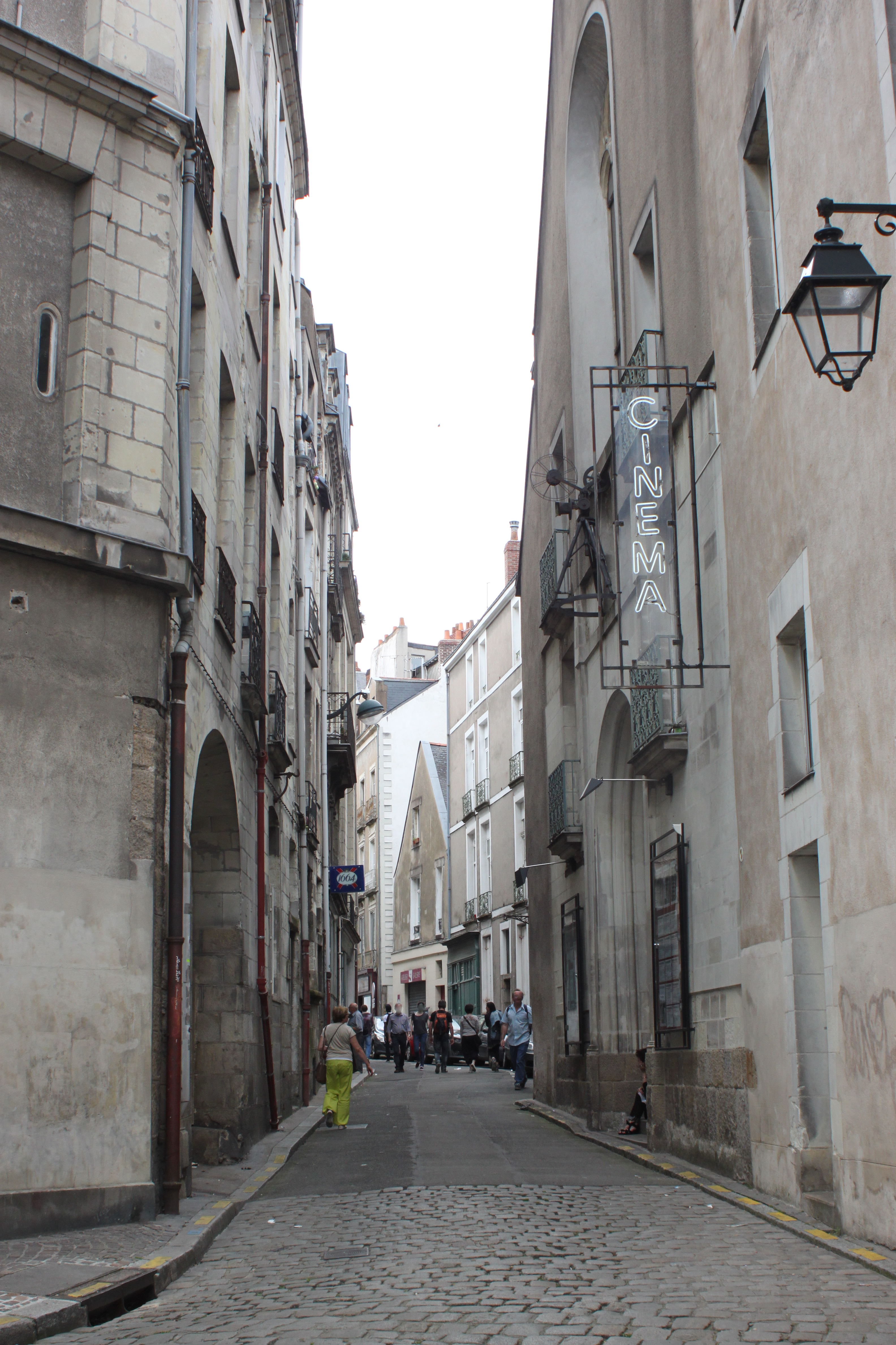 Rue des Carmélites, Fr-44-Nantes.